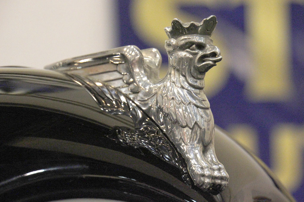 1939 Stoewer 3.6 ltr_IMG_2857